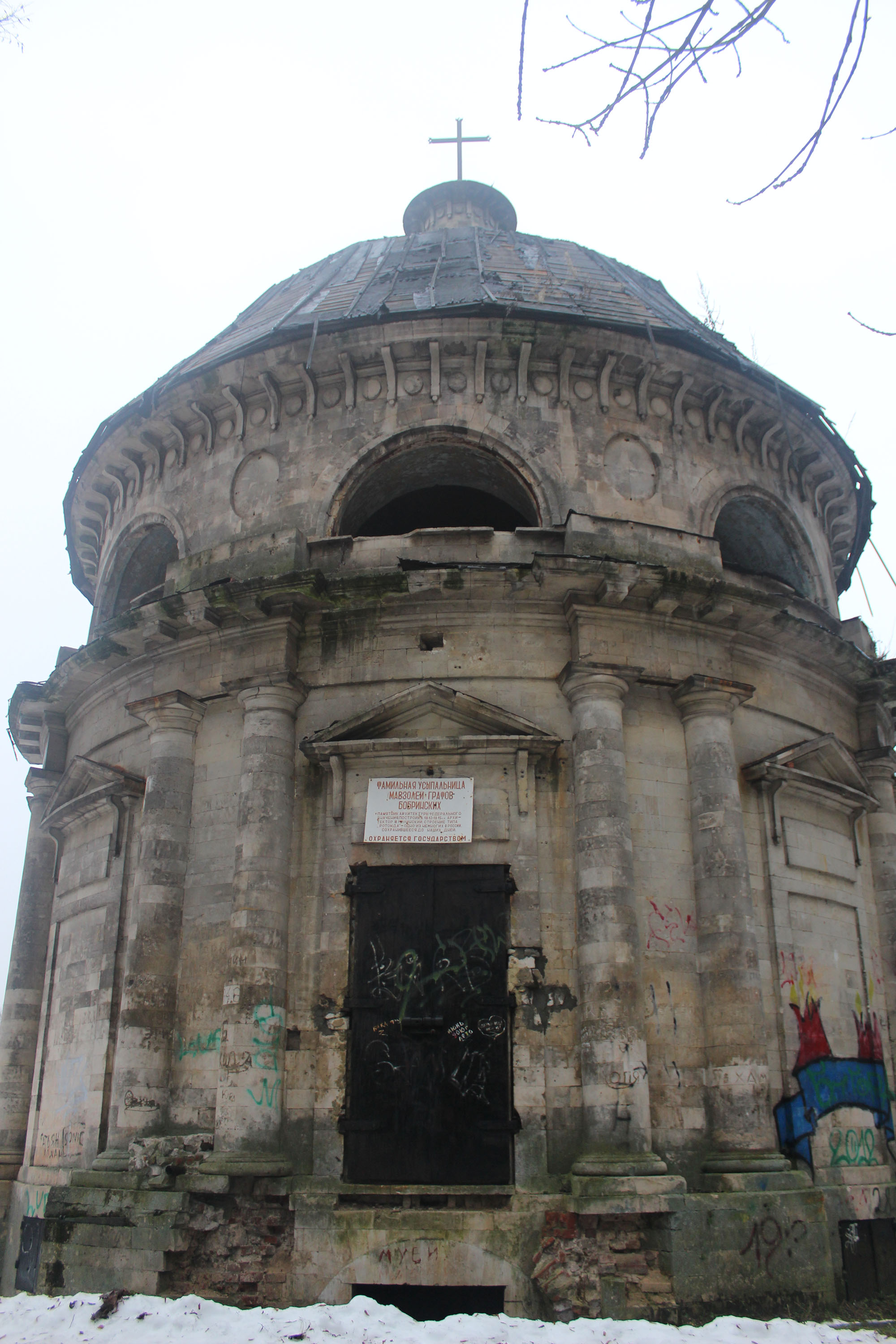 Усыпальница графов Бобринских, г. Донской, Тульская область